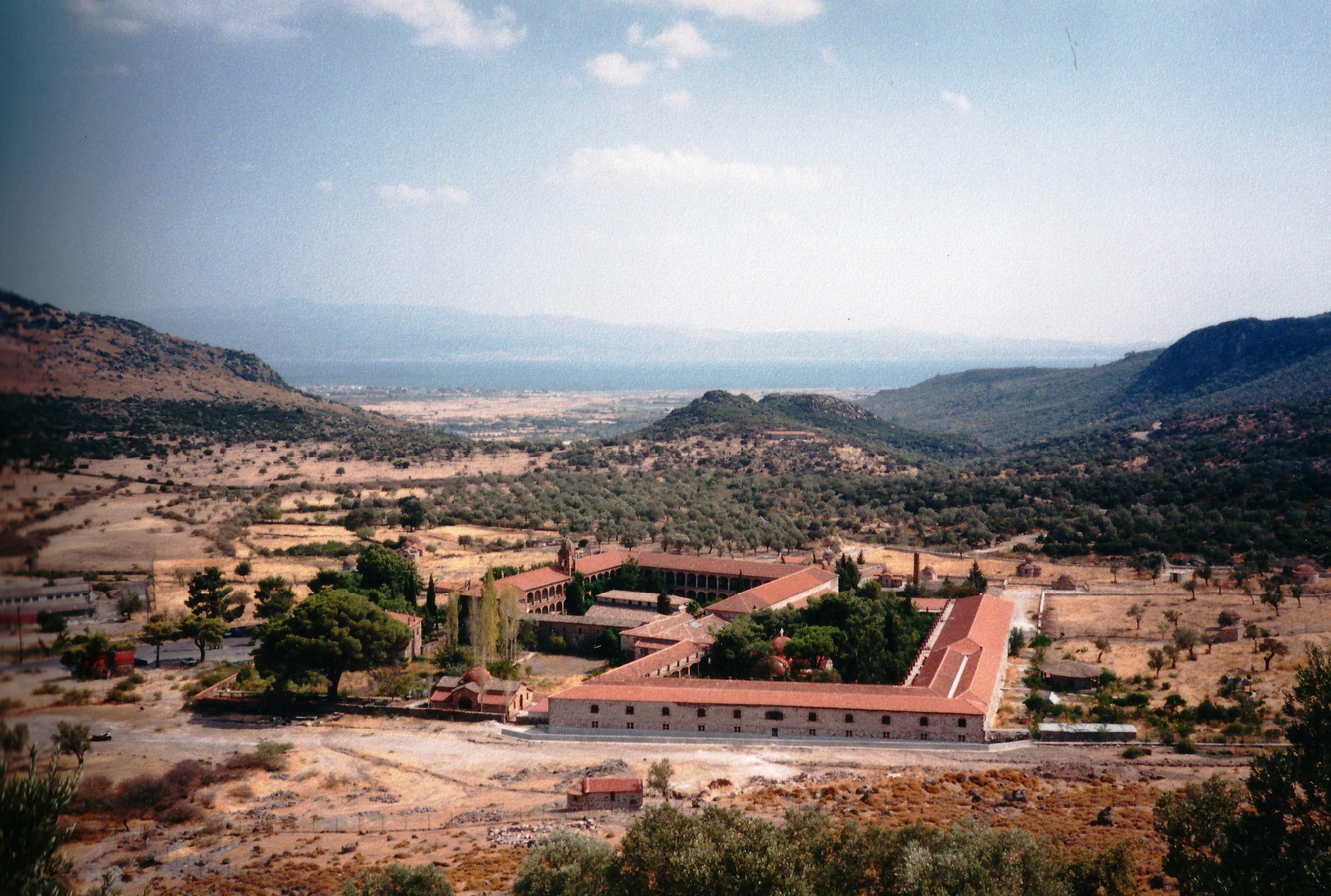 Μονή Ταξιαρχών Λειμώνος στα Δάφια«Μονή Ταξιαρχών Λειμώνος στα Δάφια»